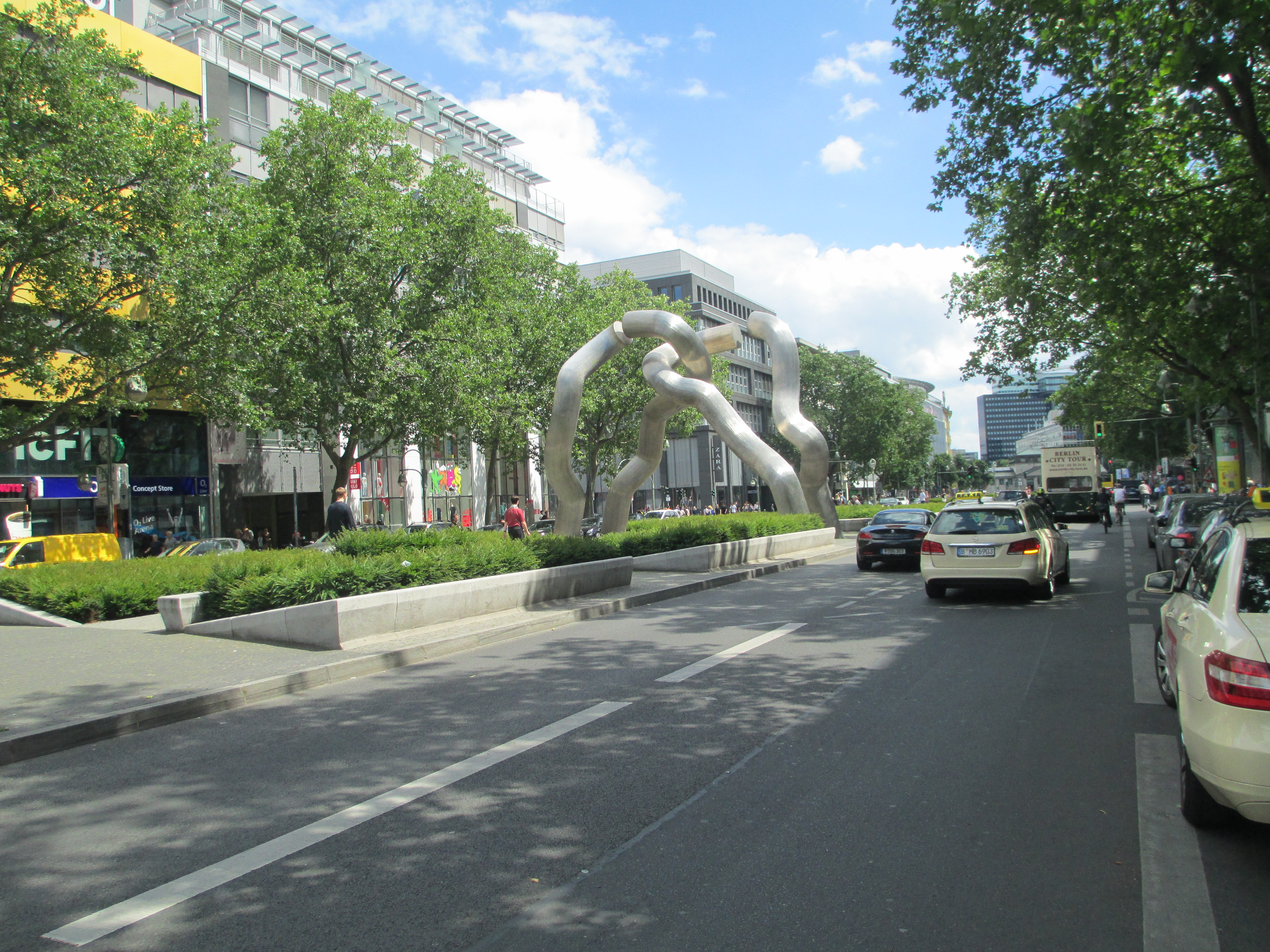 ברלין (פסל)